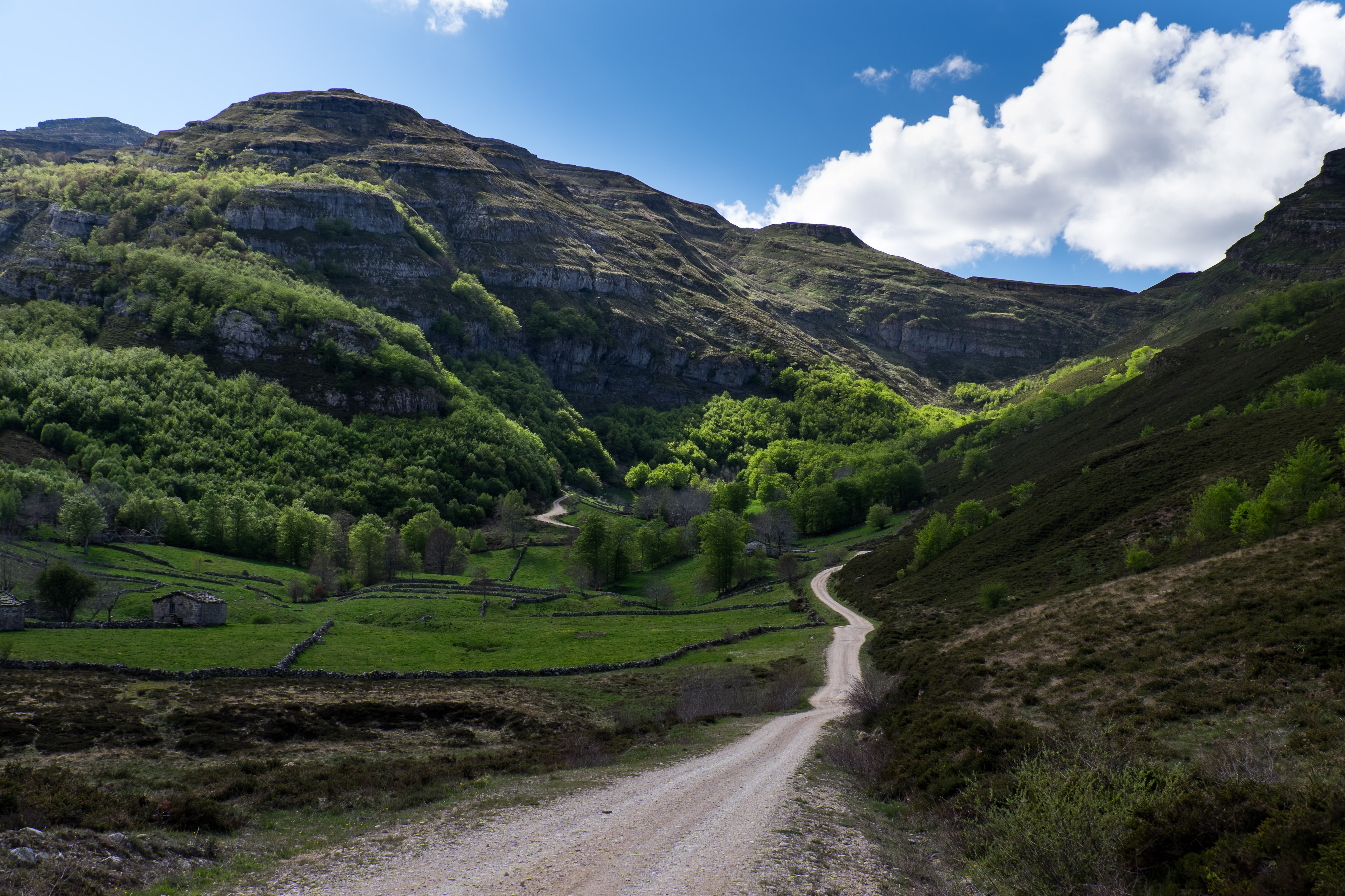 Río Pas This is a photography of a Special Area of Conservation in Spain with the ID: ES4120088. Natura2000 entry, EEA entry